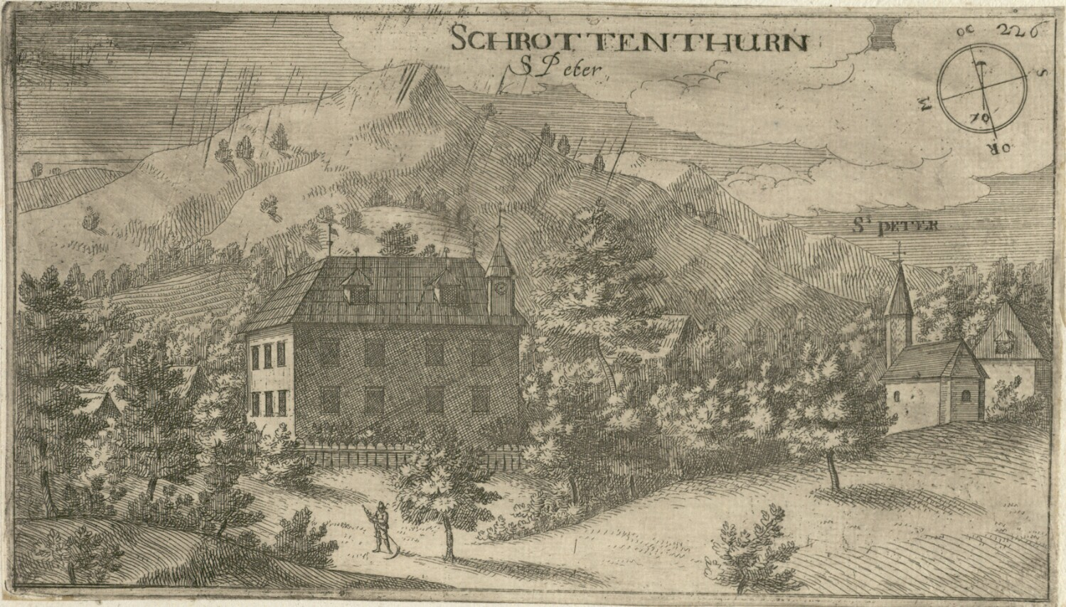 Šrotenturn